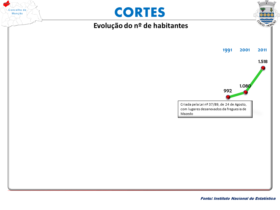 Censos 1864/2011